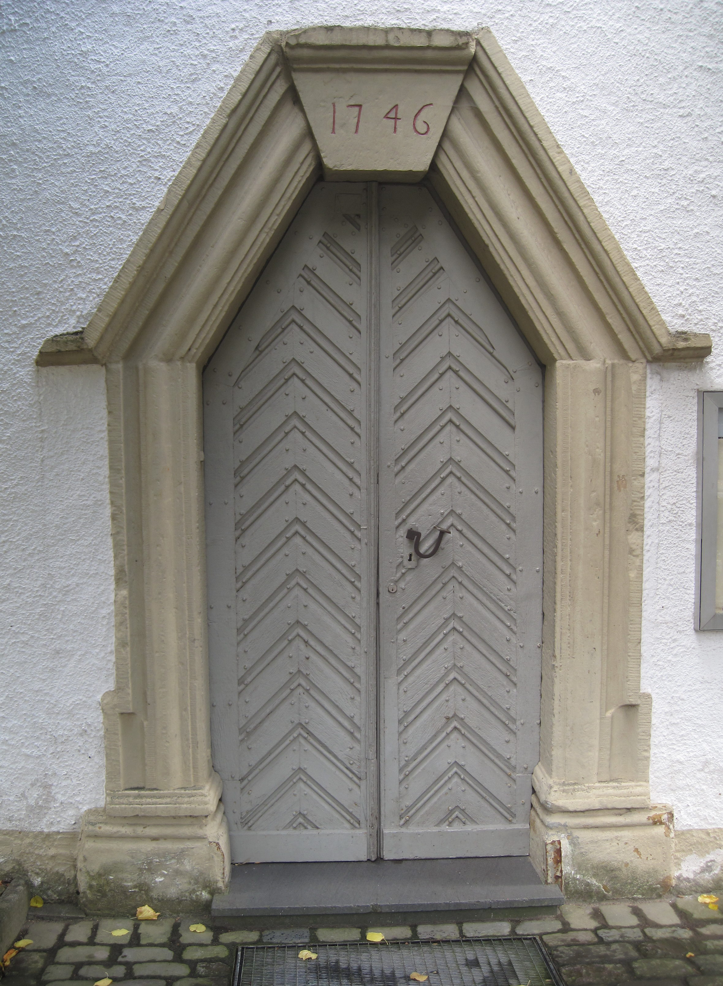 Eingangsportal Alte Pfarrkirche St. Thomas in Hallenberg-Liesen, Dorfstraße 22. This image shows a heritage building in Germany, located in the North Rhine-Westphalian city Hallenberg (no. A013).